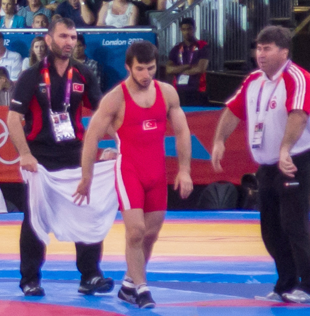 Kazakhstan v Turkey